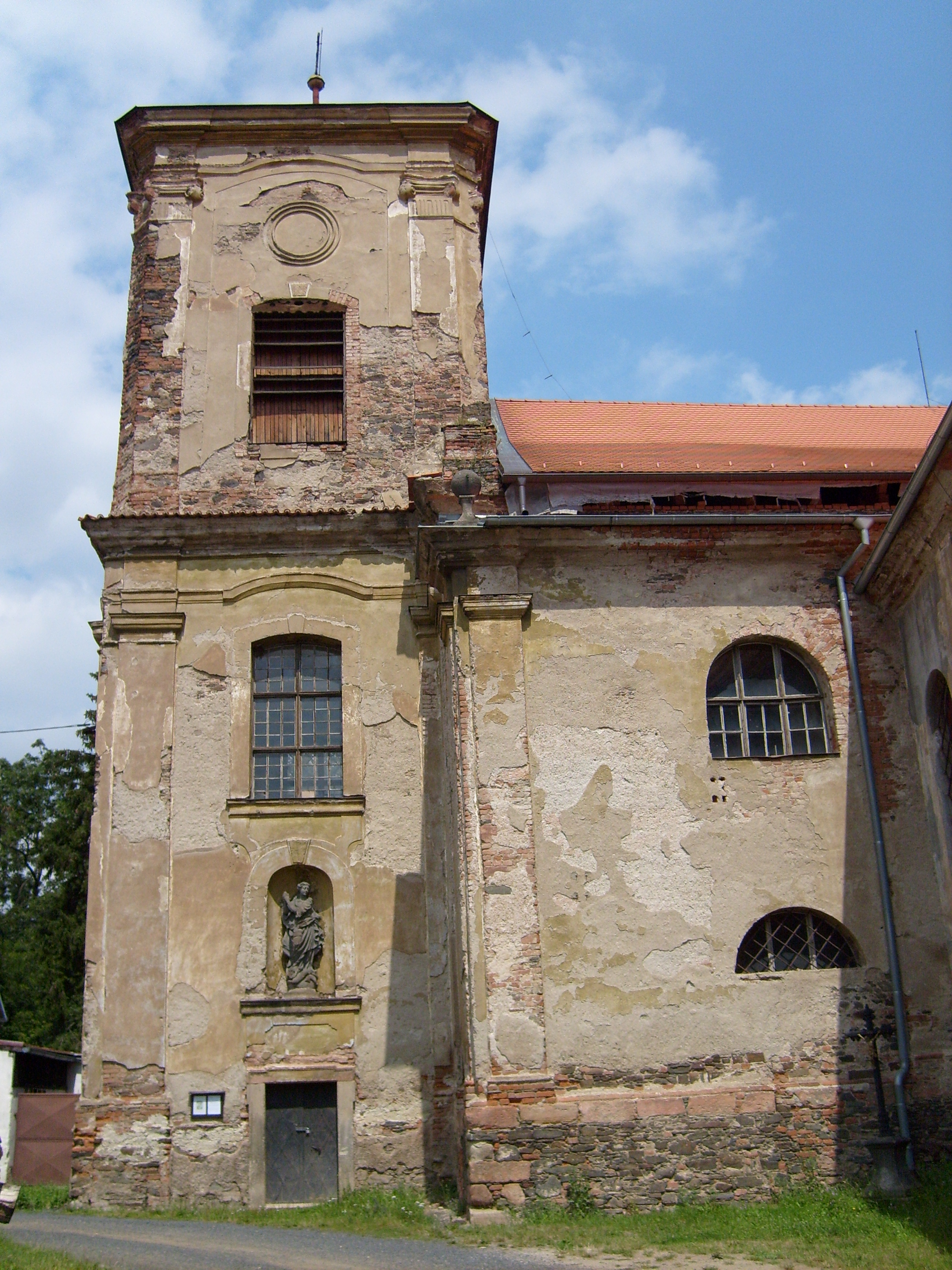 Kostel Jména Panny Marie, Chyše, Karlovy Vary Region, Czech Republic